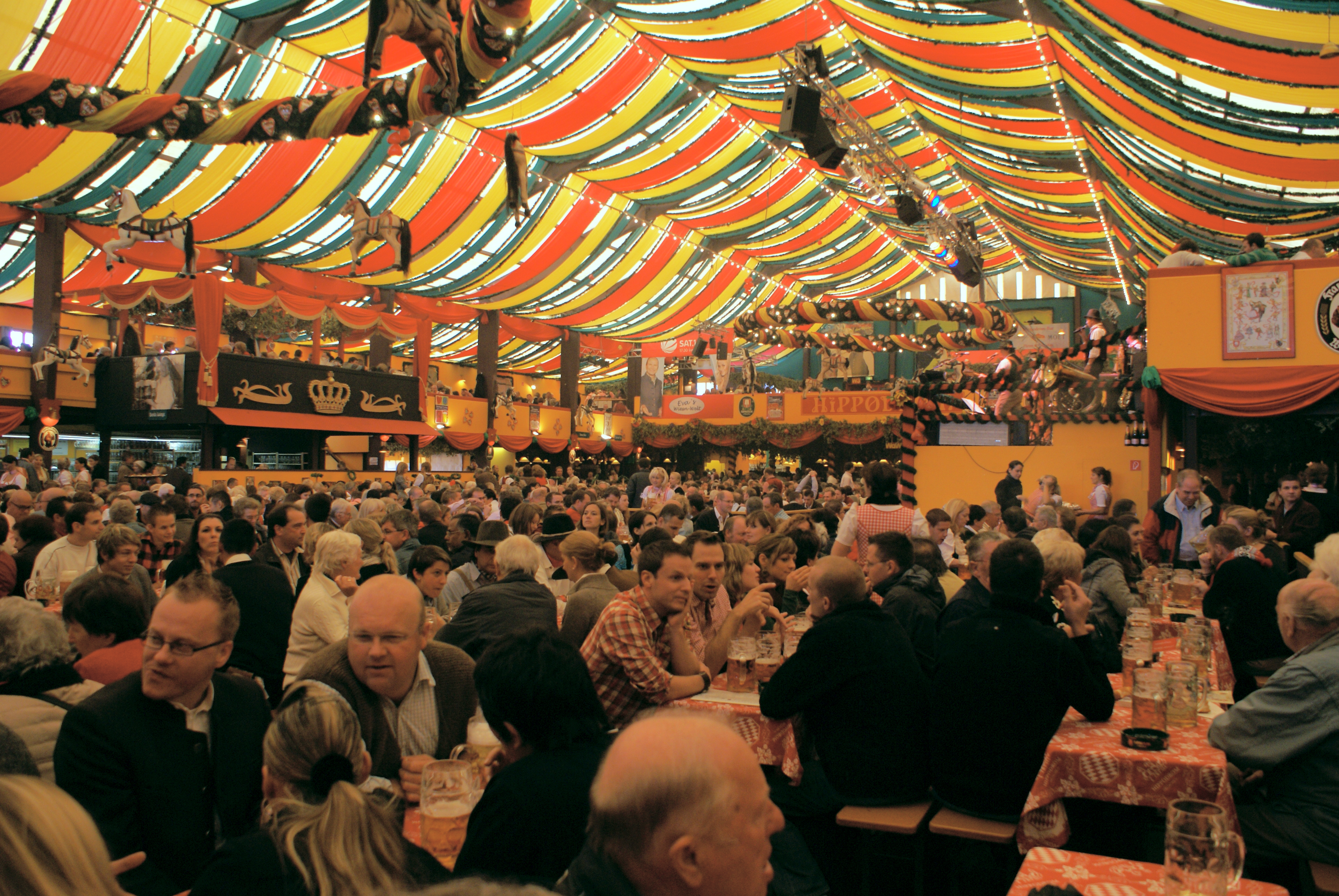 Палатка Хипподром внутри, 2008